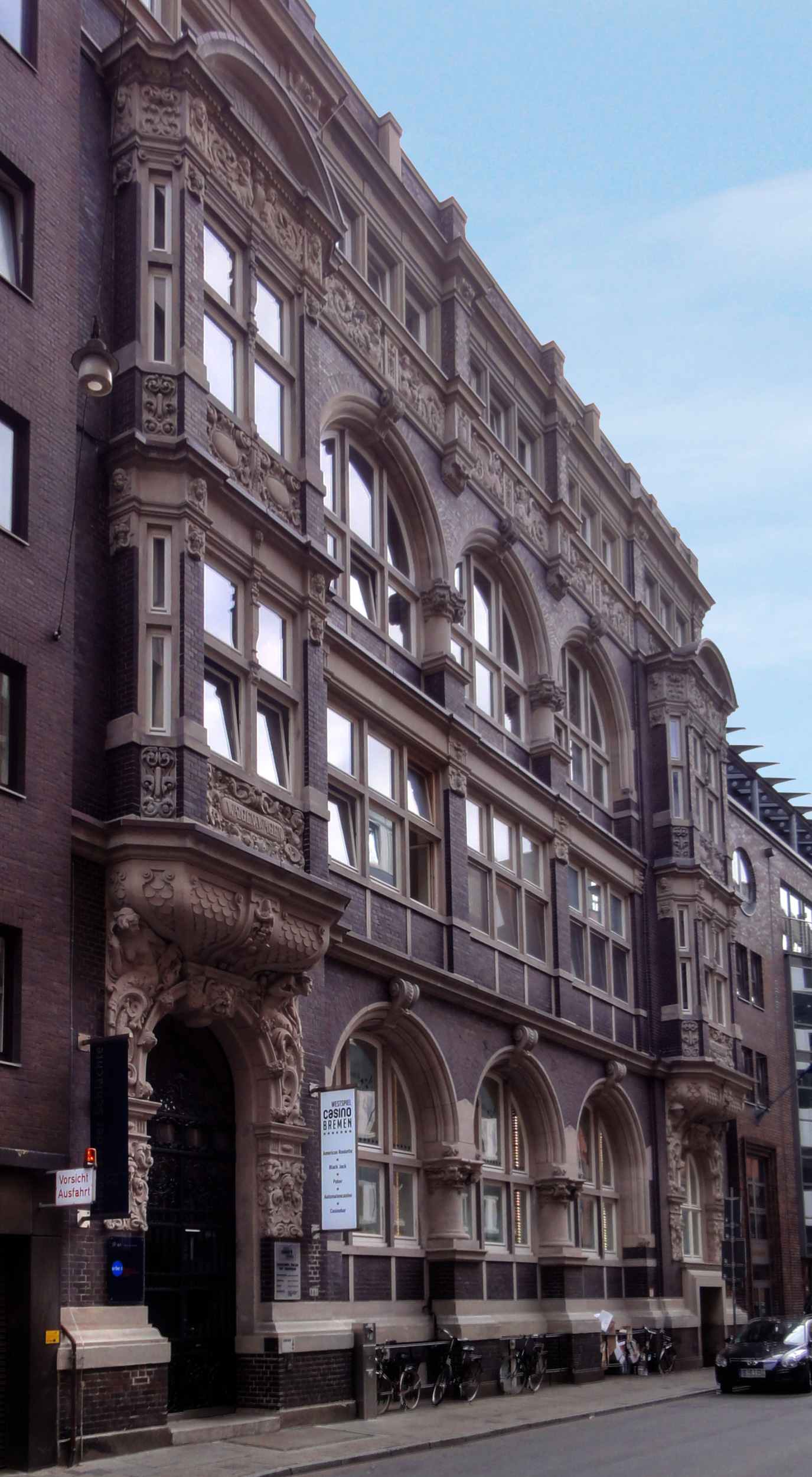 Reisbörse, Argo-Haus, Amt für Stadtplanung und Bauordnung in Bremen, Langenstraße 38Das abgebildete Objekt ist ein geschütztes Kulturdenkmal in der Freien Hansestadt Bremen, mit der Nr. 0835 beim Landesamt für Denkmalpflege registriert.